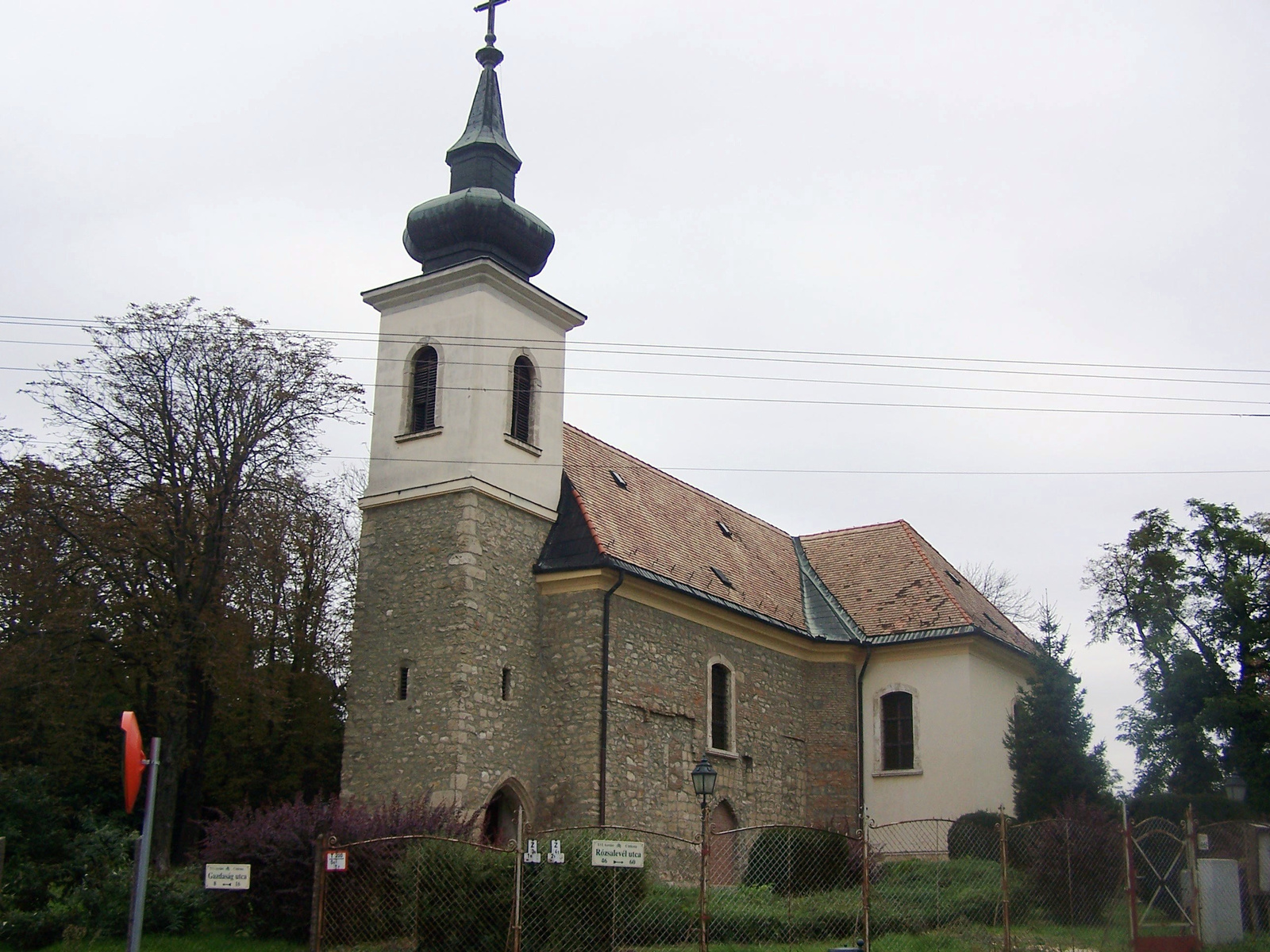 Ev. templom (Budapest 16, Rózsalevél utca 46.) This is a photo of a monument in Hungary. Identifier: 1245